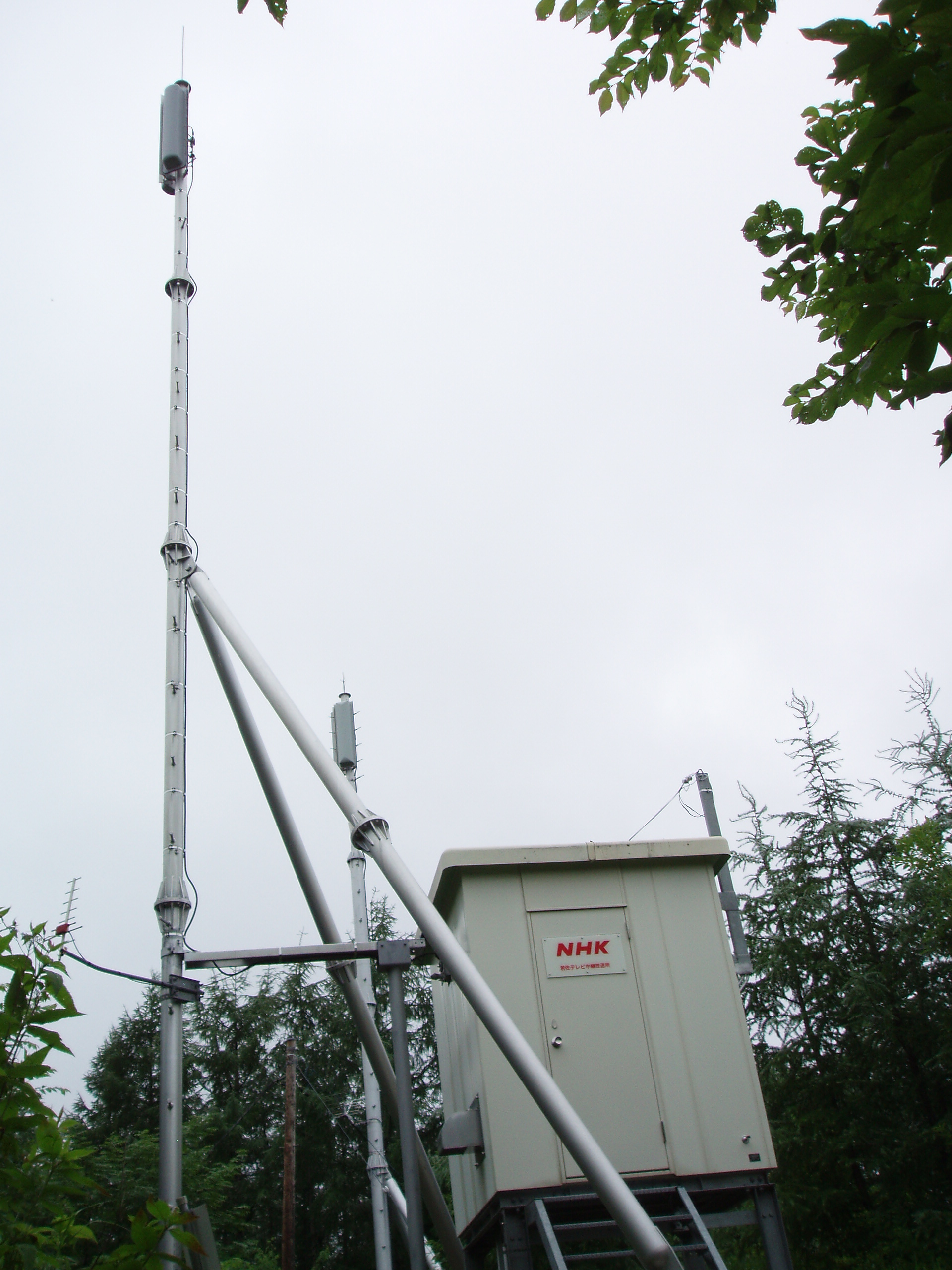 若佐中継局 NHK送信設備